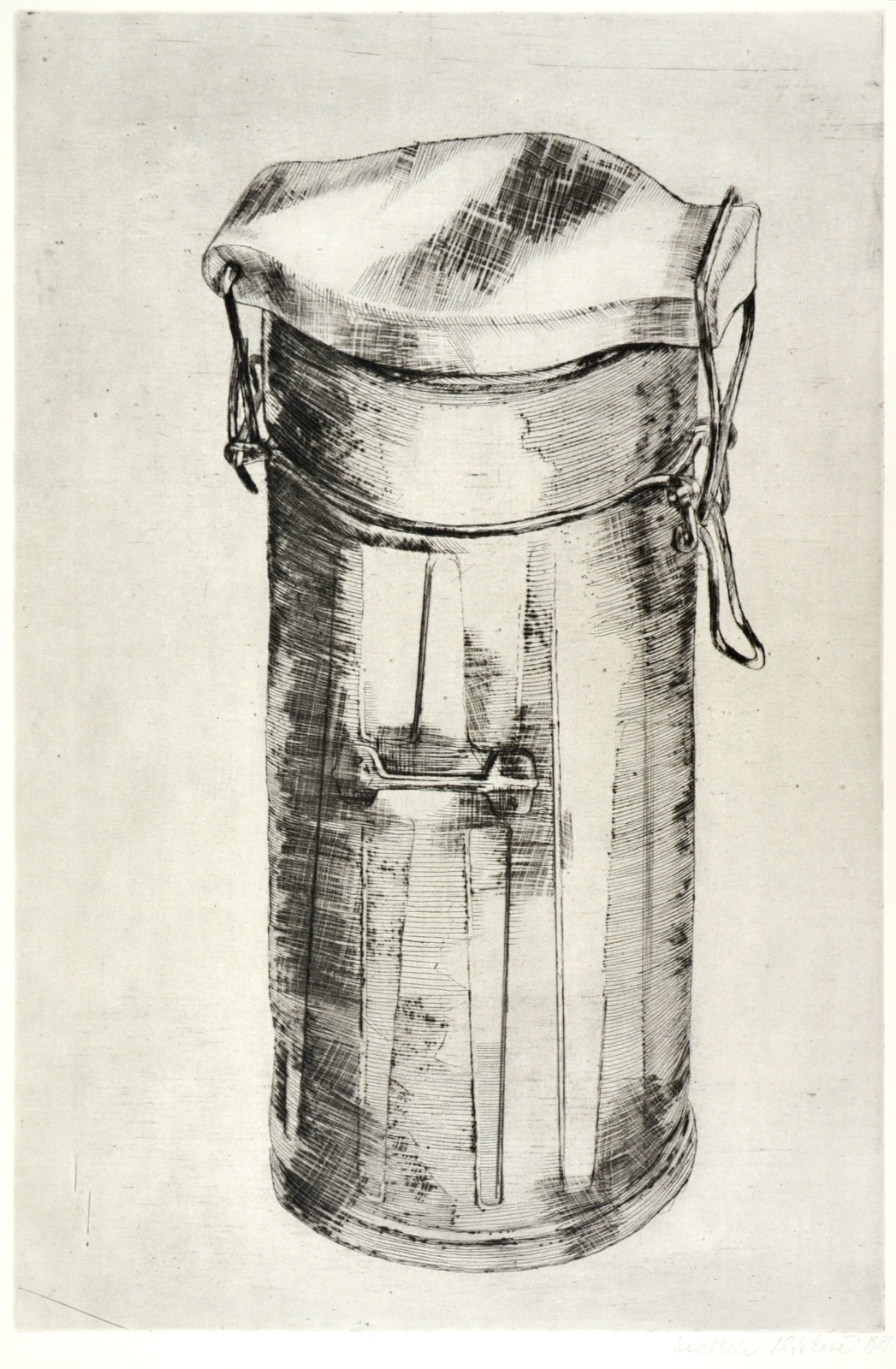 Naděžda Plíšková, Bez názvu, suchá jehla, 49,5x32,5 cm, 1981